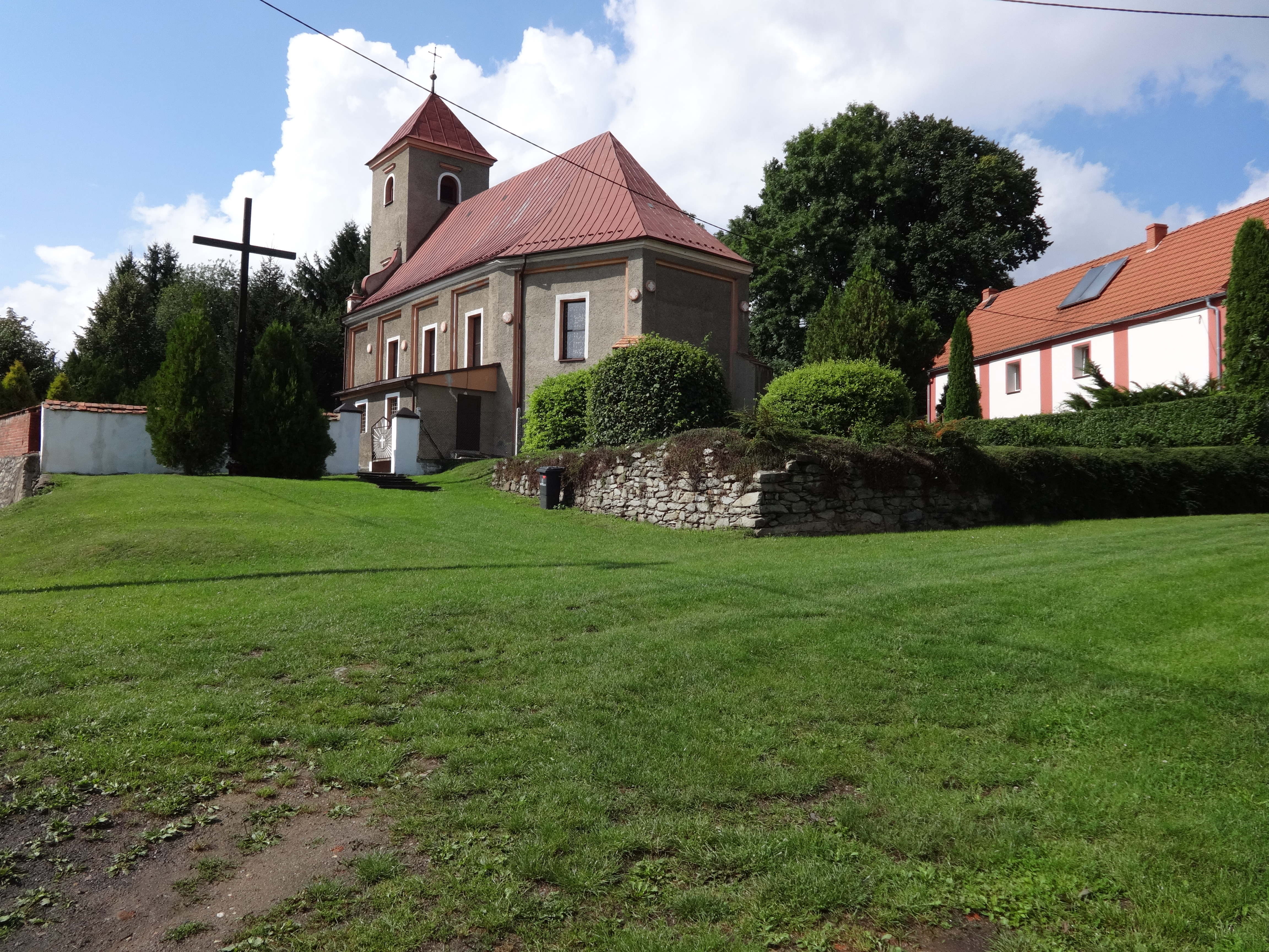 Lasowice, kościół par. p.w. Wniebowzięcia NMP, 1792